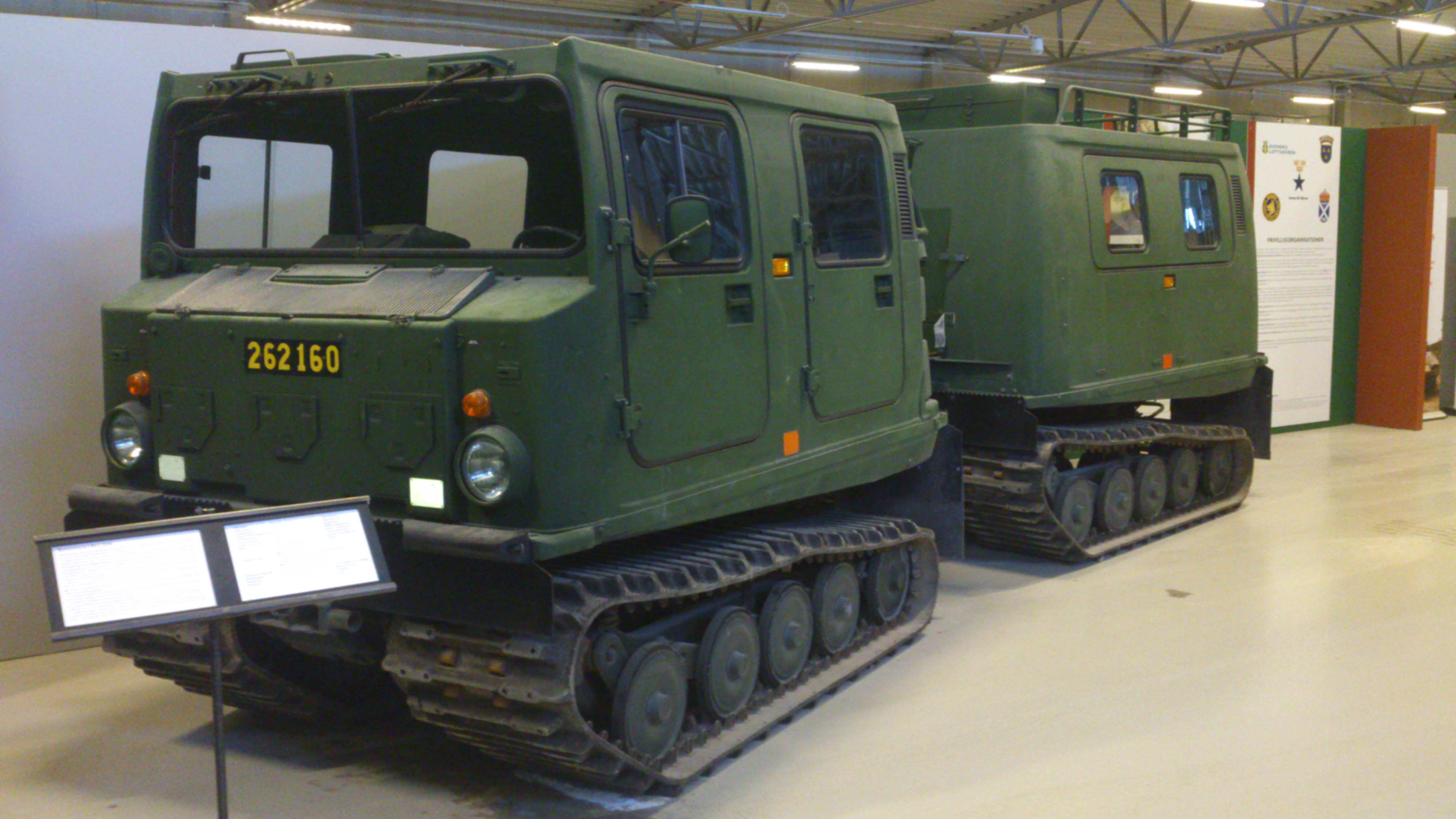 Bandvagn 206 på Försvarsfordonsmuseet Arsenalen.